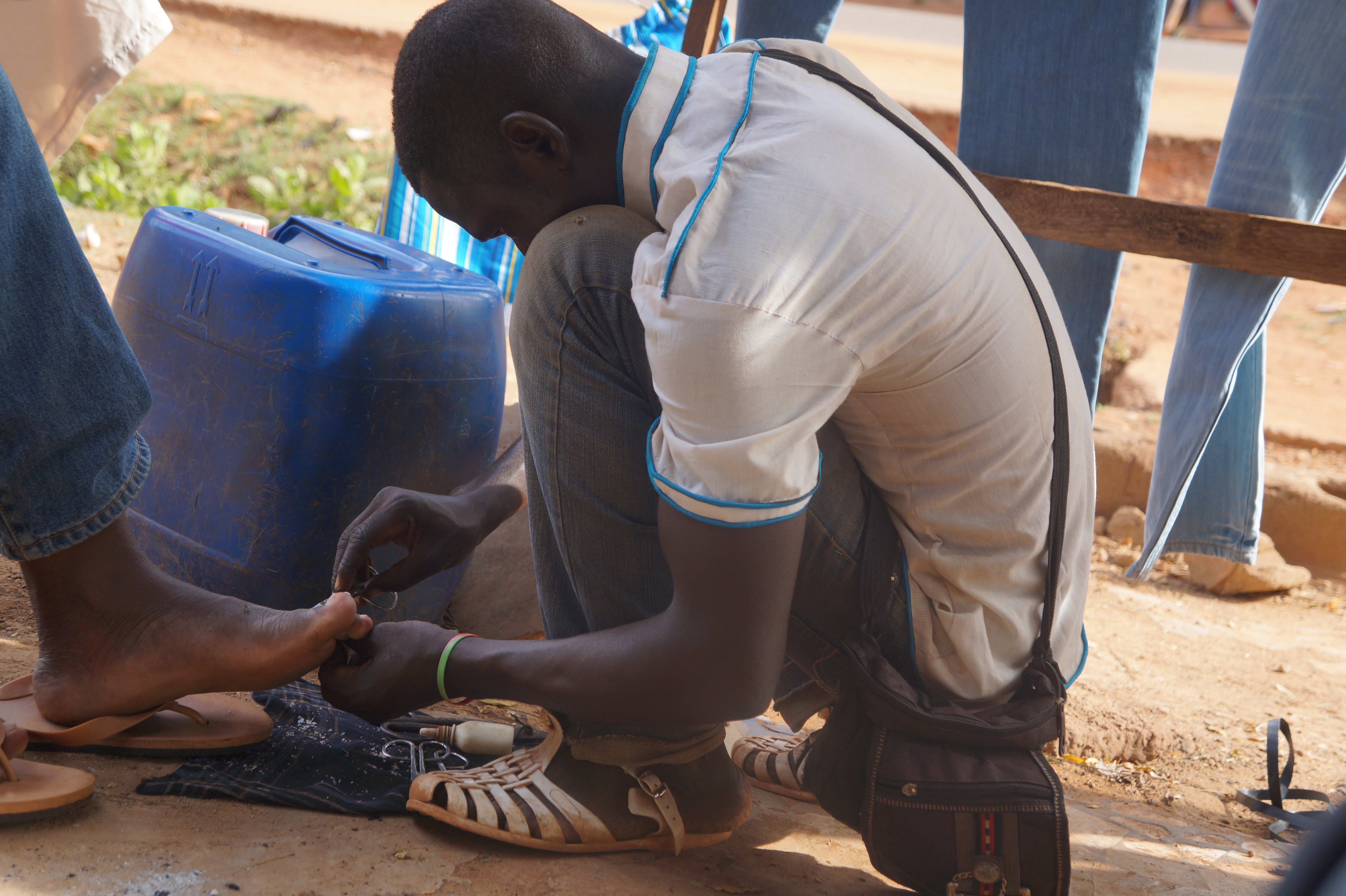 Pédicure ambulante à Bamako This is an image of "African people at work" from Mali